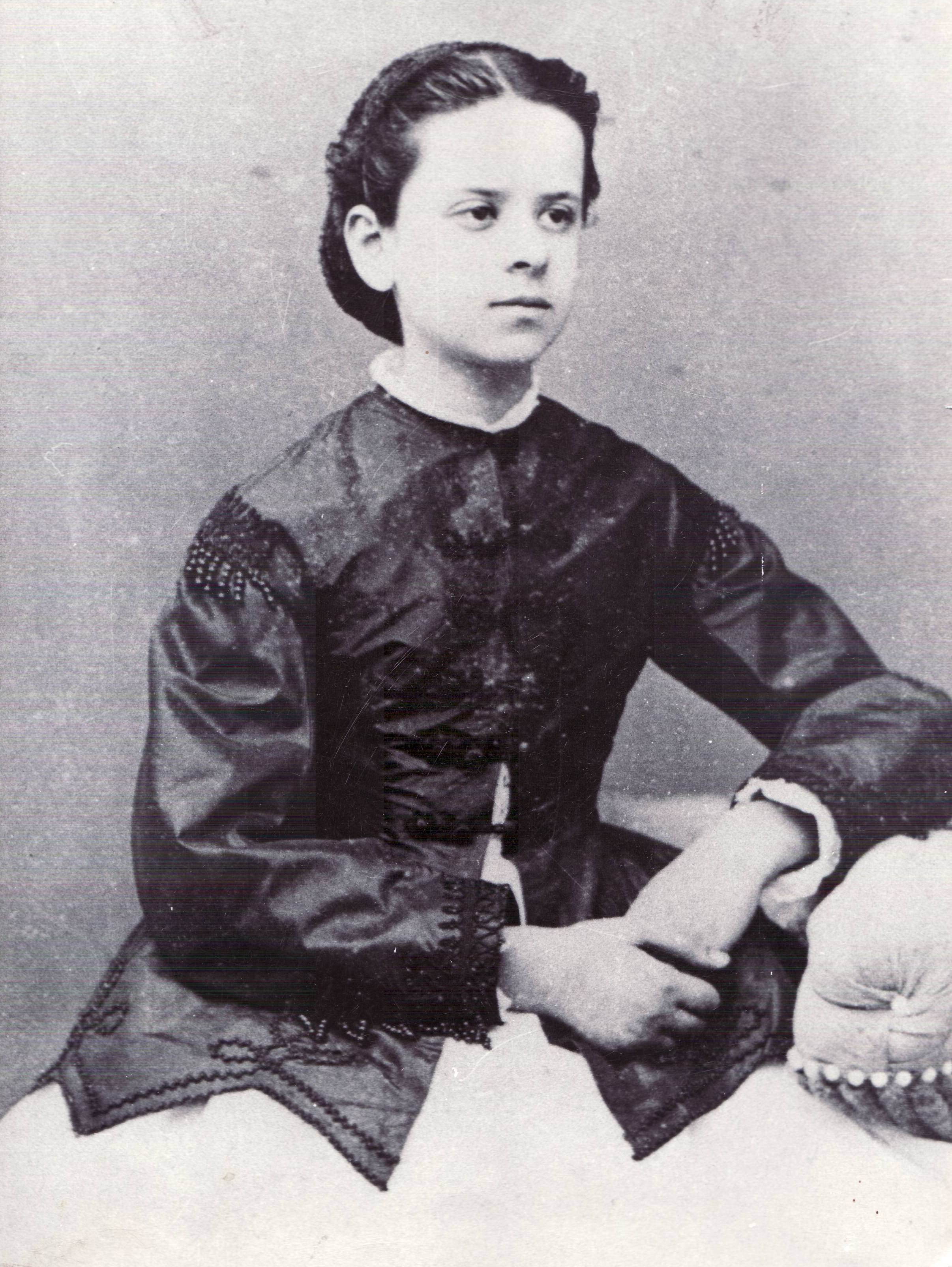 Časna sestra Marija Krucifiksa Kozuliž sa 15 godina.